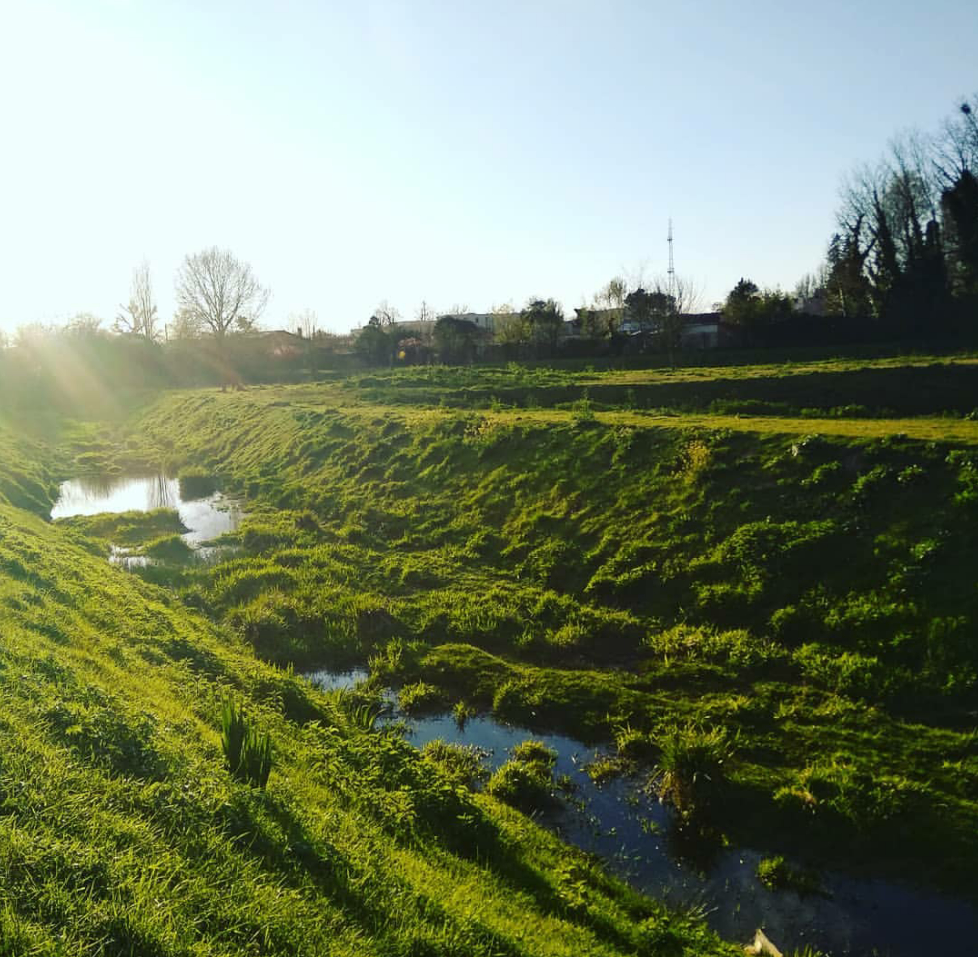 L'Eau Bourde traversant le Pont-de-la-Maye près du lieu-dit Madère